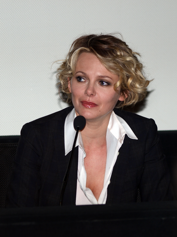 Barbora Bobulova - Foto di G. M. Ireneo Alessi (Sinix)